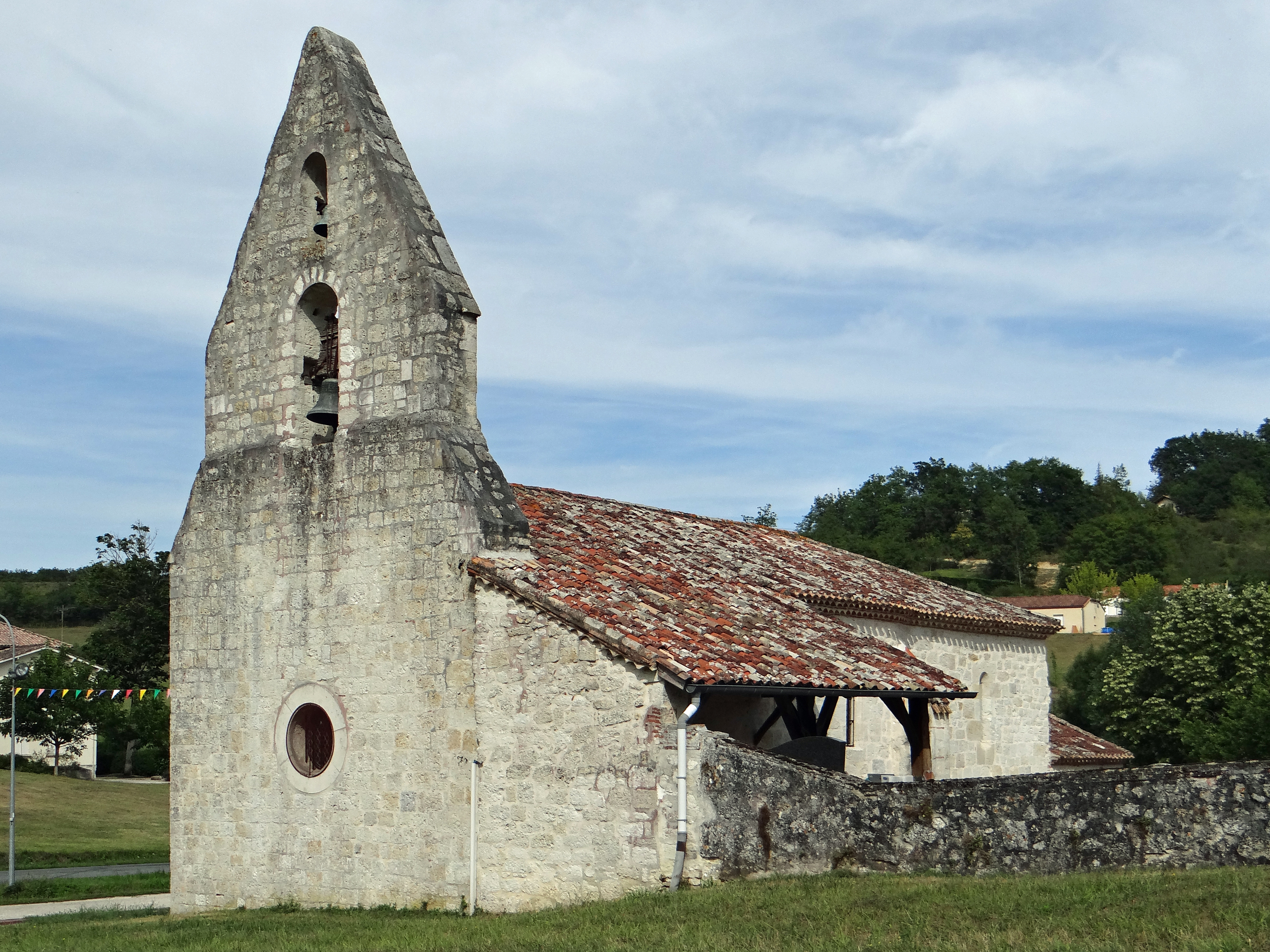 Saint-Urcisse (Lot-et-Garonne) - Église Saint-Urcisse - Clocher-mur